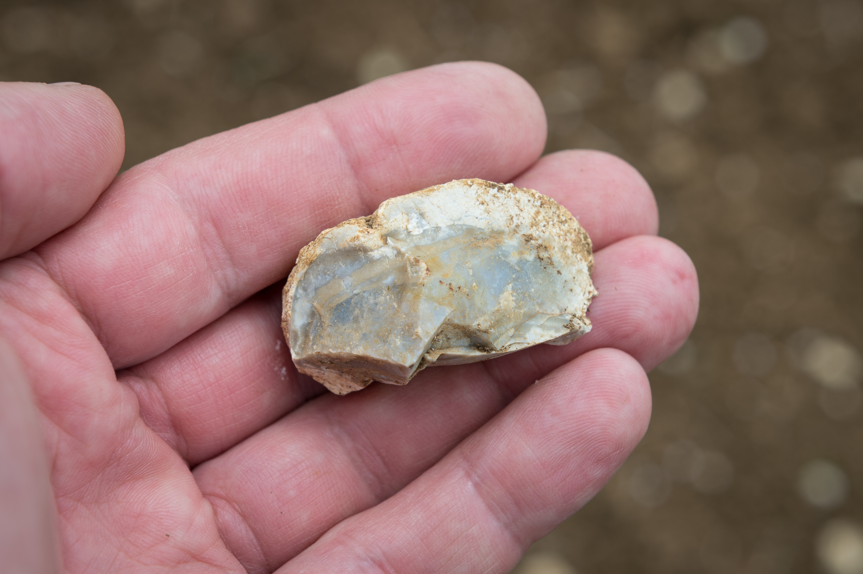 Hornsteinknolle von einem Acker im Steinheimer Becken, Baden-Württemberg, Deutschland.